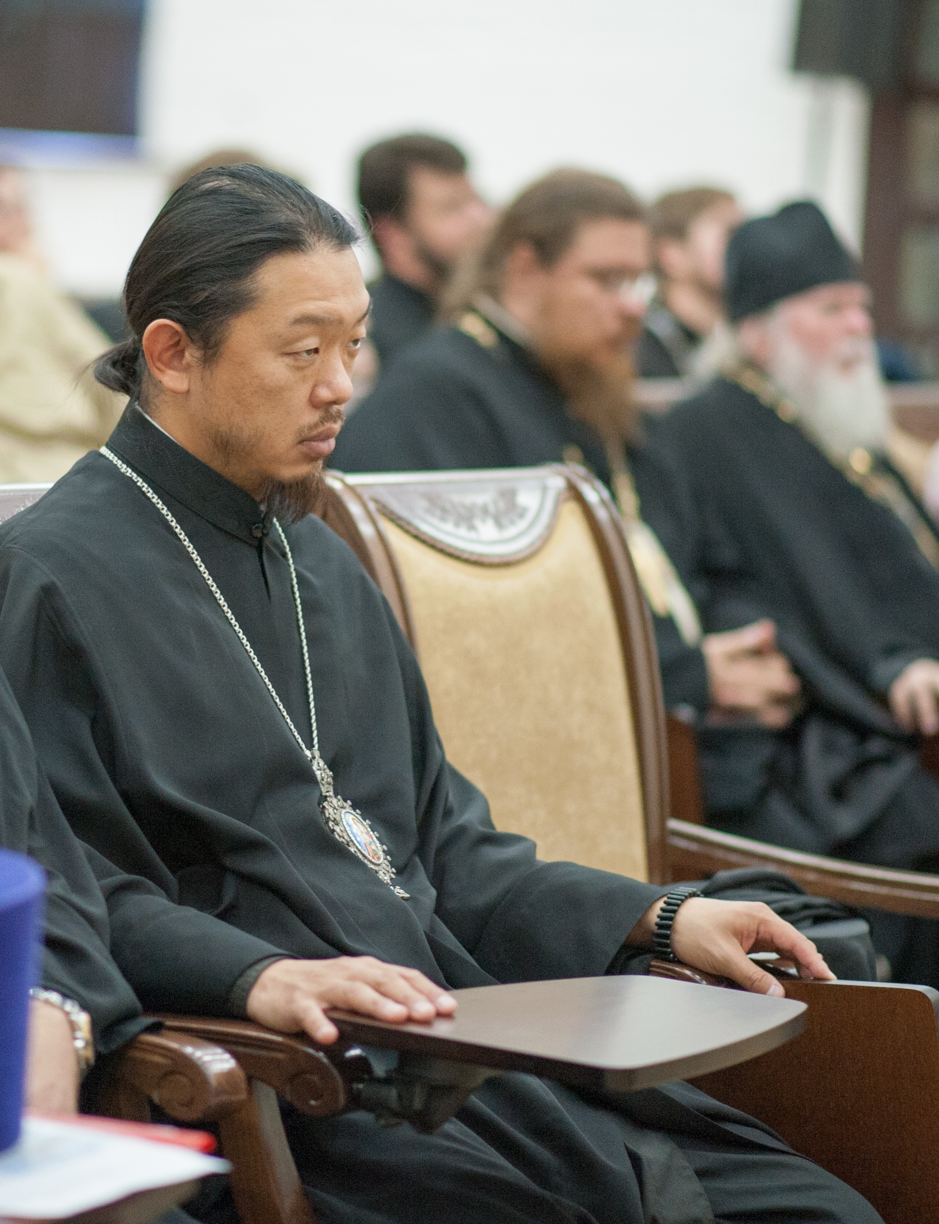 Епископ Феофан на Астраханском православном народном форуме. 21 сентября 2015 года